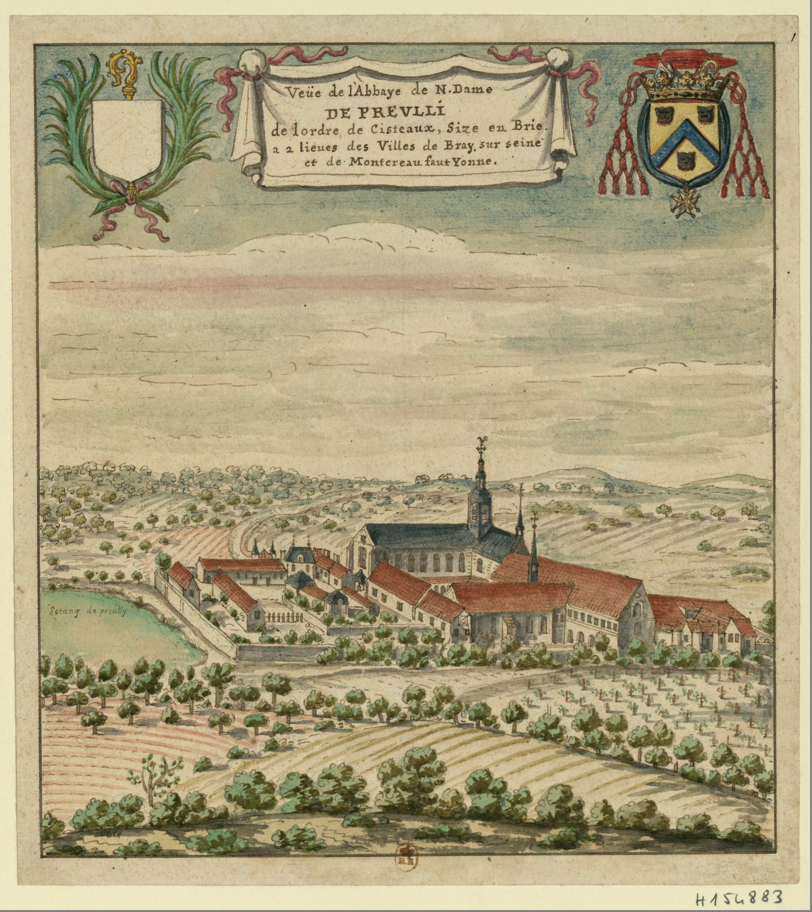 Dessin de Louis Boudan en 1704 pour Gaignières.